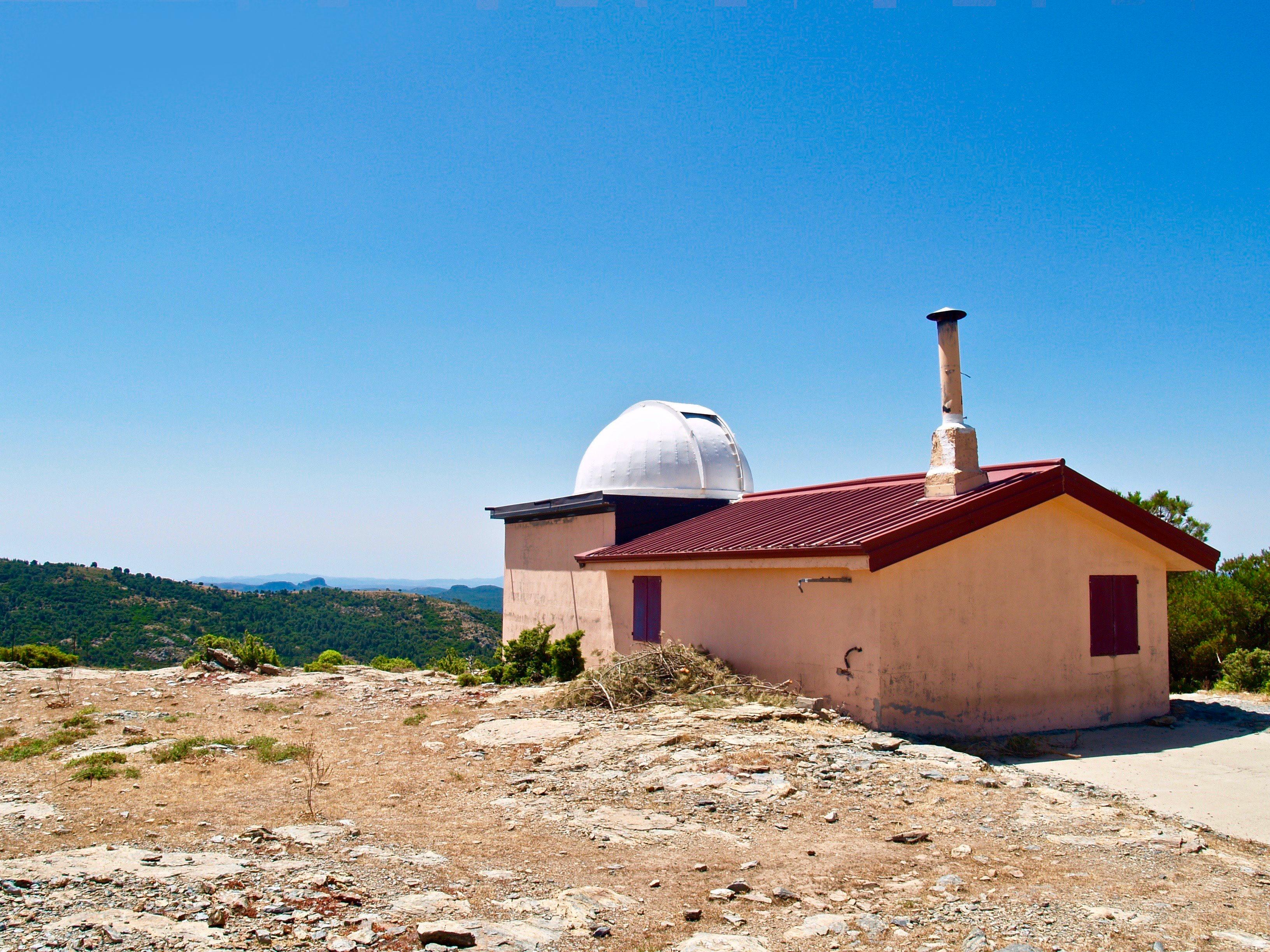 L'Osservatorio astronomico Ferdinando Caliumi, nel Comune di Gairo (Nu). Foto del luglio 2008.